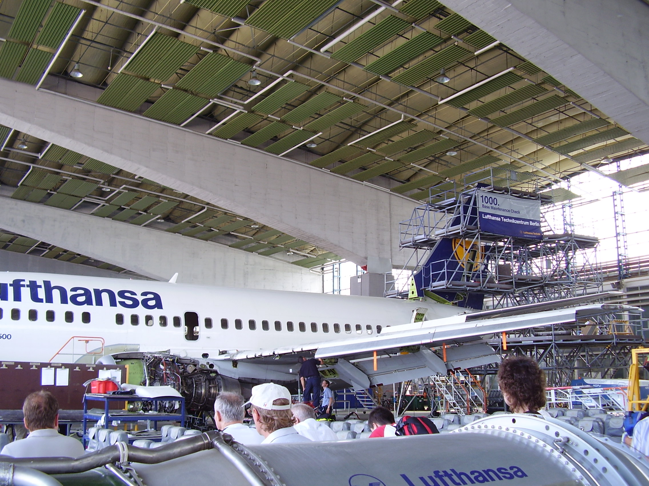 ILA 2008